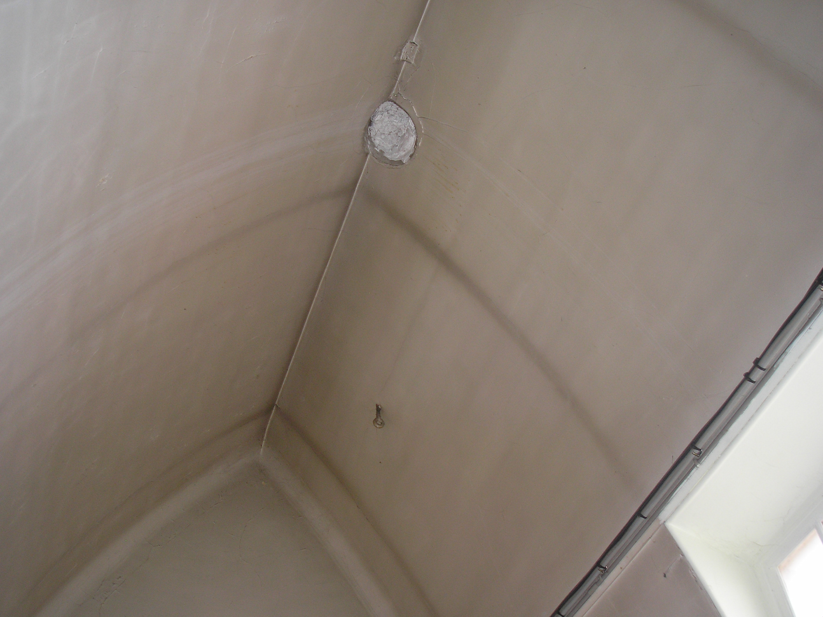 Voûte ogivale du Pavillon des blessés d'Argenteuil : l'évacuation d'air par le lanterneau a été rebouchée, on voit les angles arrondis et la trace des fermes métalliques.